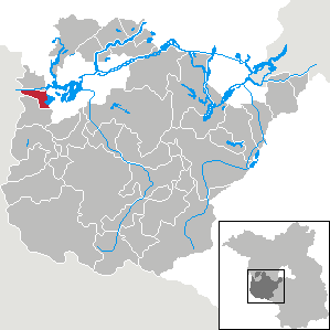 Wusterwitz in Brandenburg (Country) - District Potsdam-Mittelmark